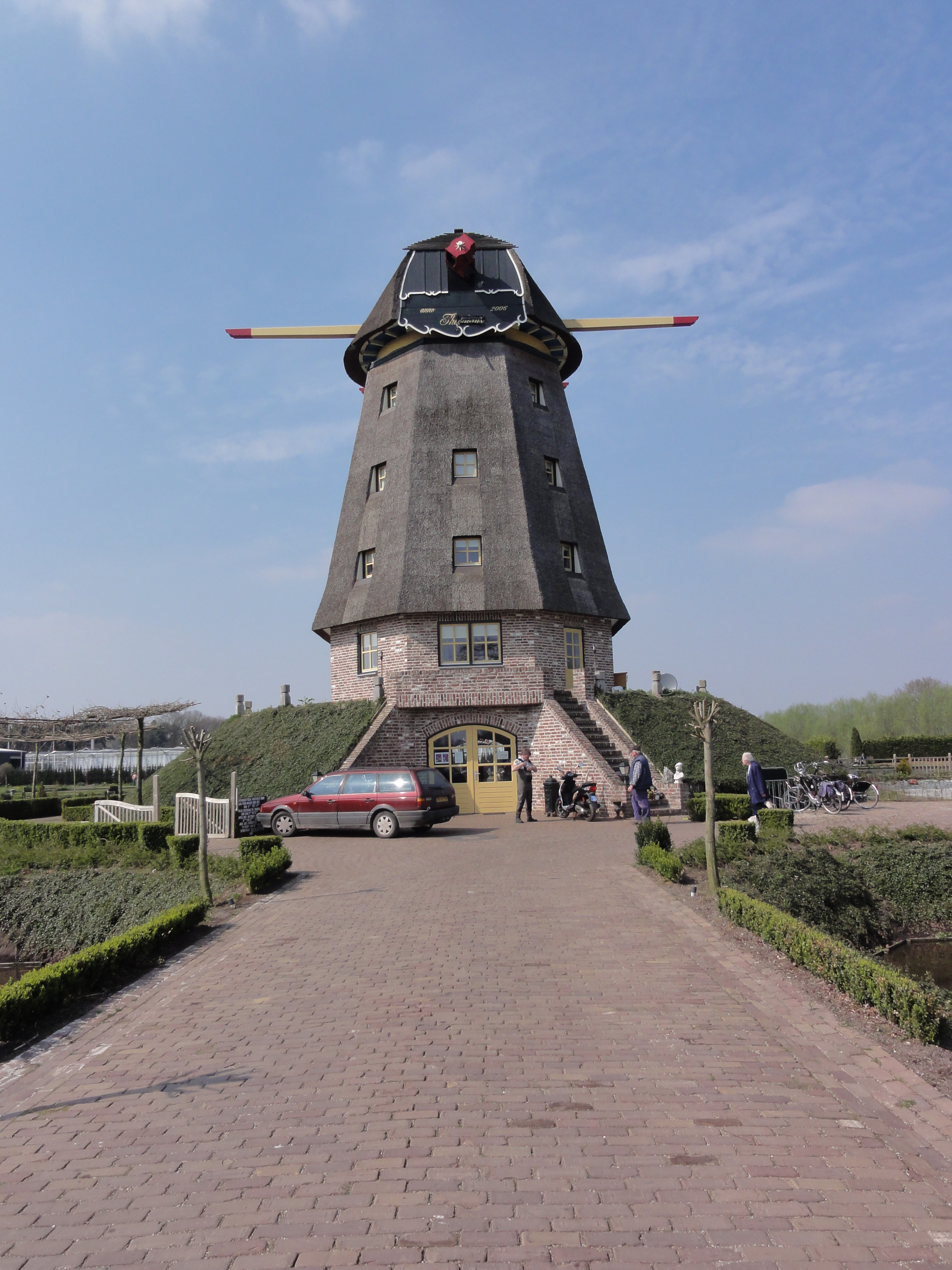 Venray Blitterswijck, gerestaureerde molenromp